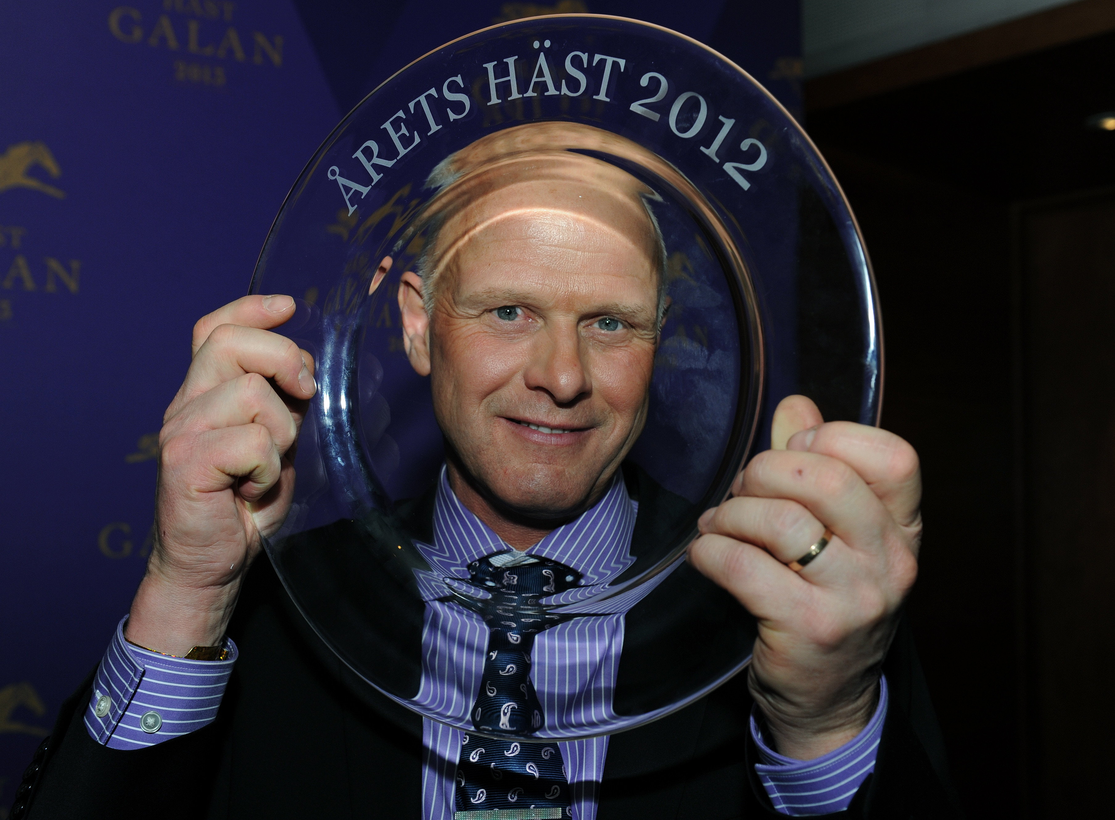 Travkusken Åke Svanstedt.